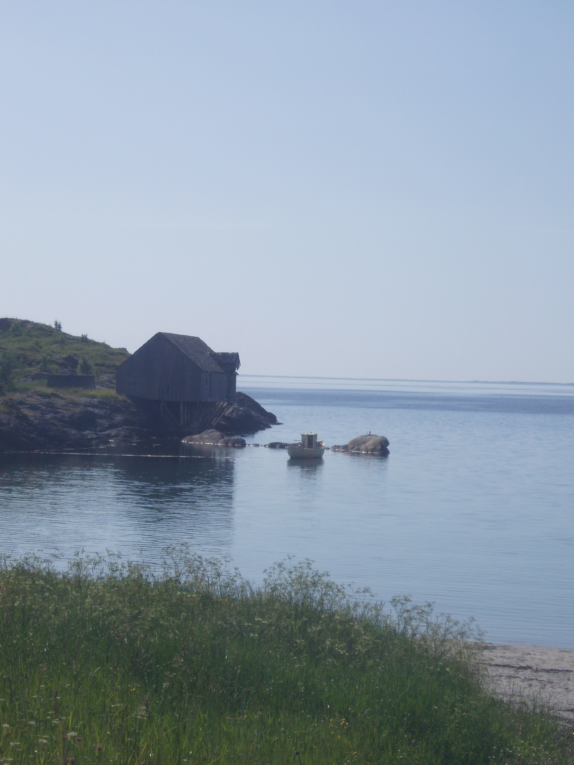 Saltfjorden near Salstraumen, seen westwards.